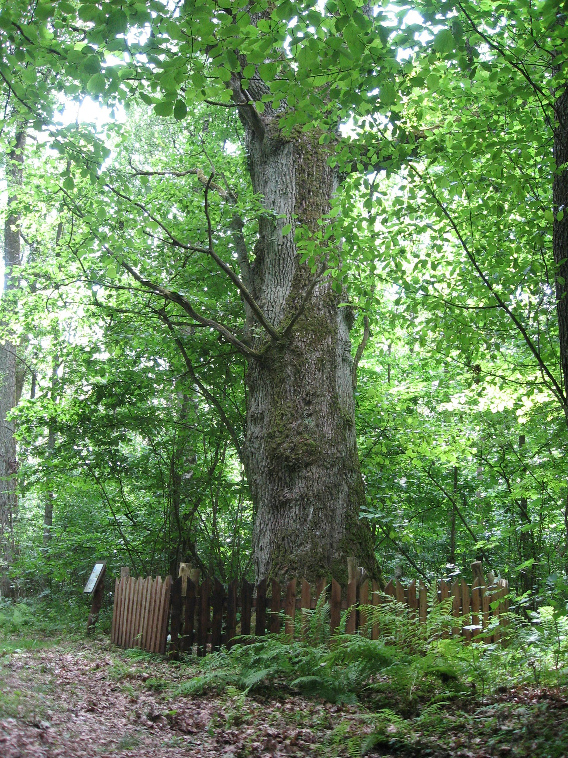 Ąžuolas Žalgirio miške, Šilutės r.